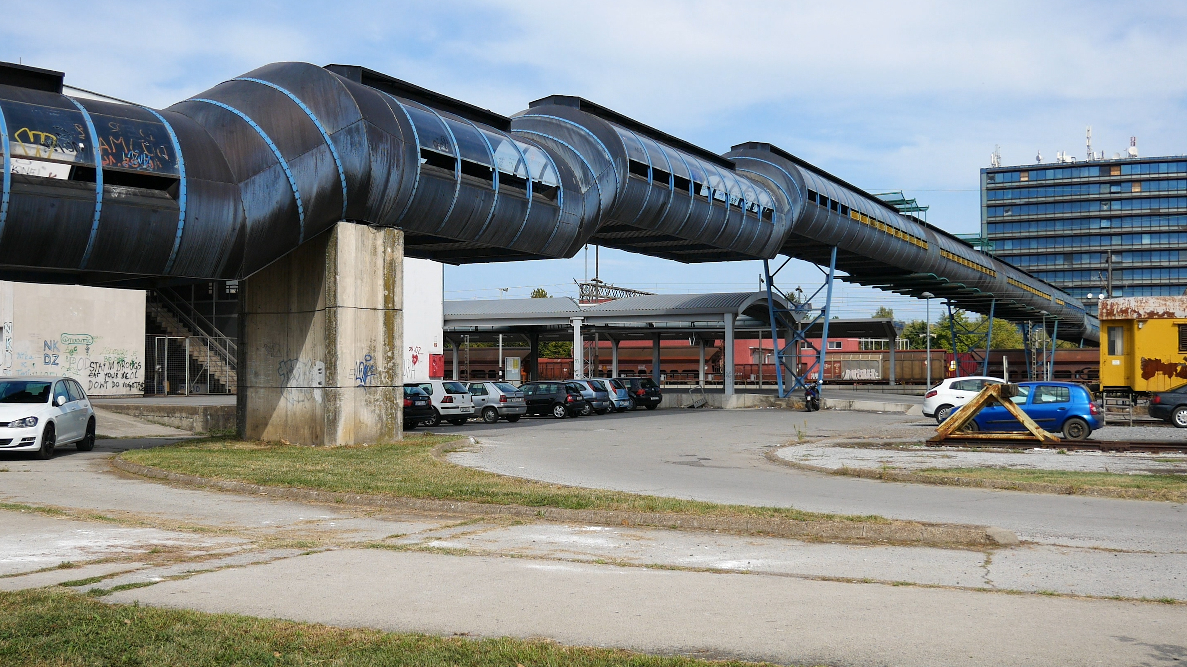 Pješački most za radnike Đure Đakovića u Slavonskom Brodu